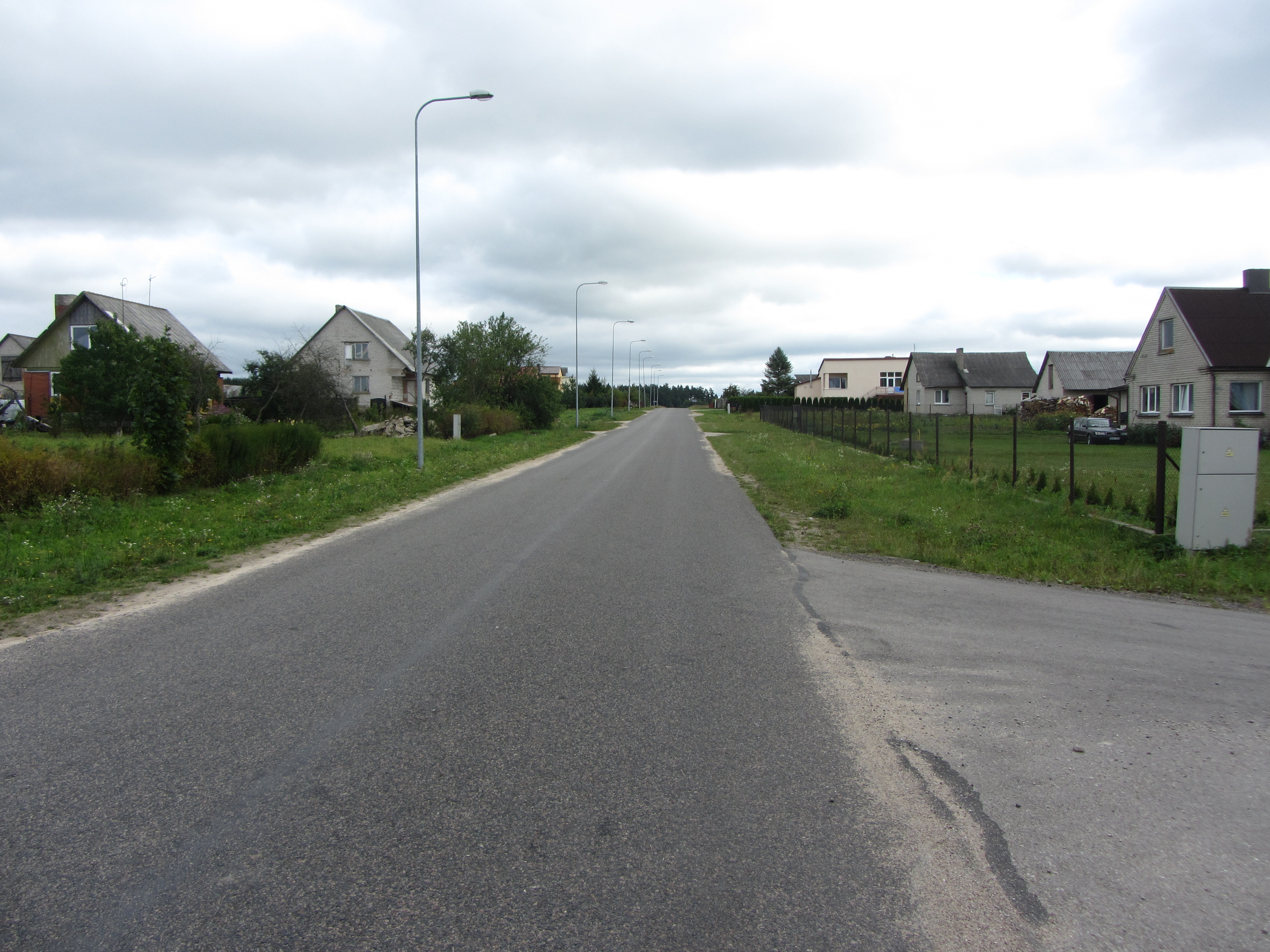 Šalčininkai, Lithuania